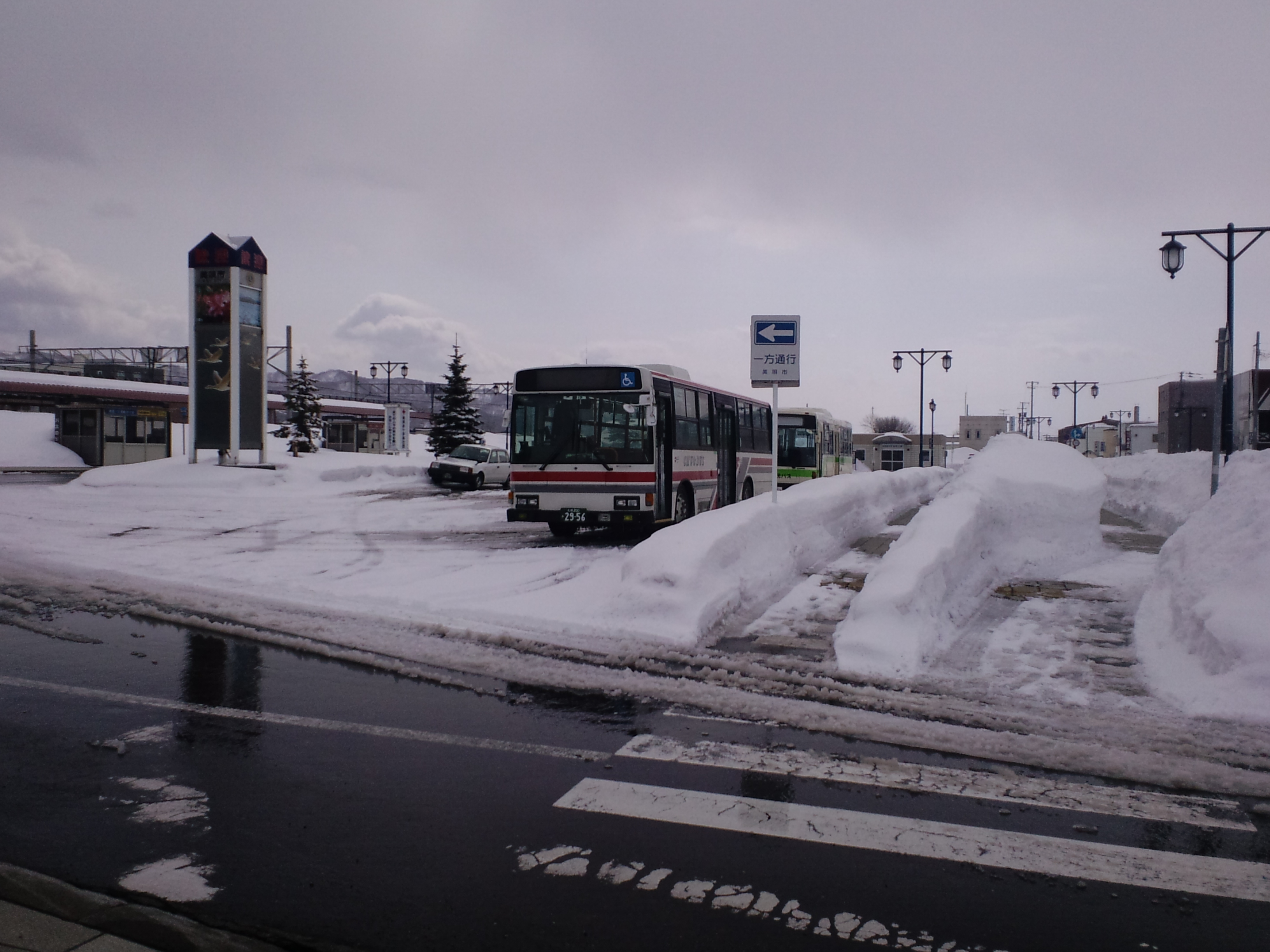 美唄駅西口広場内ののバス待機場